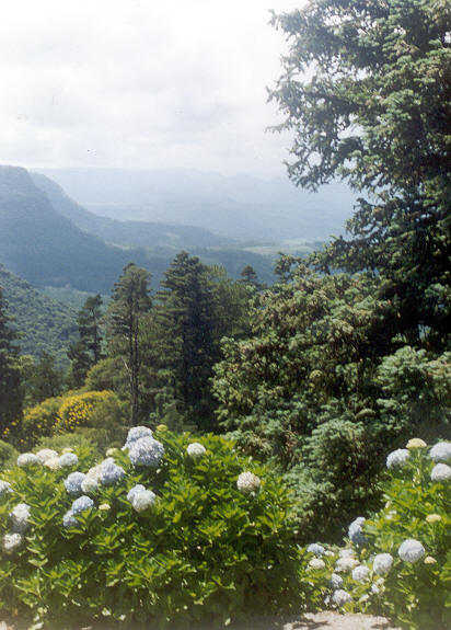 Valle de Quilombo, en Gramado